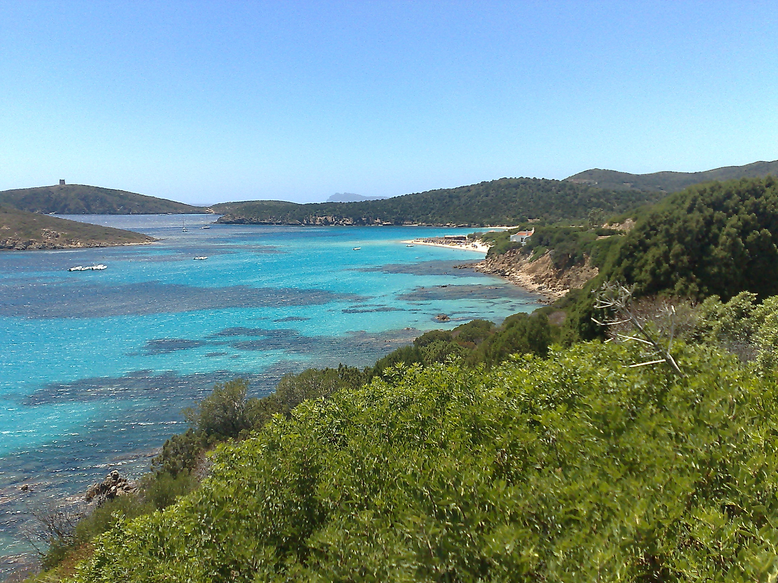 Sardinia